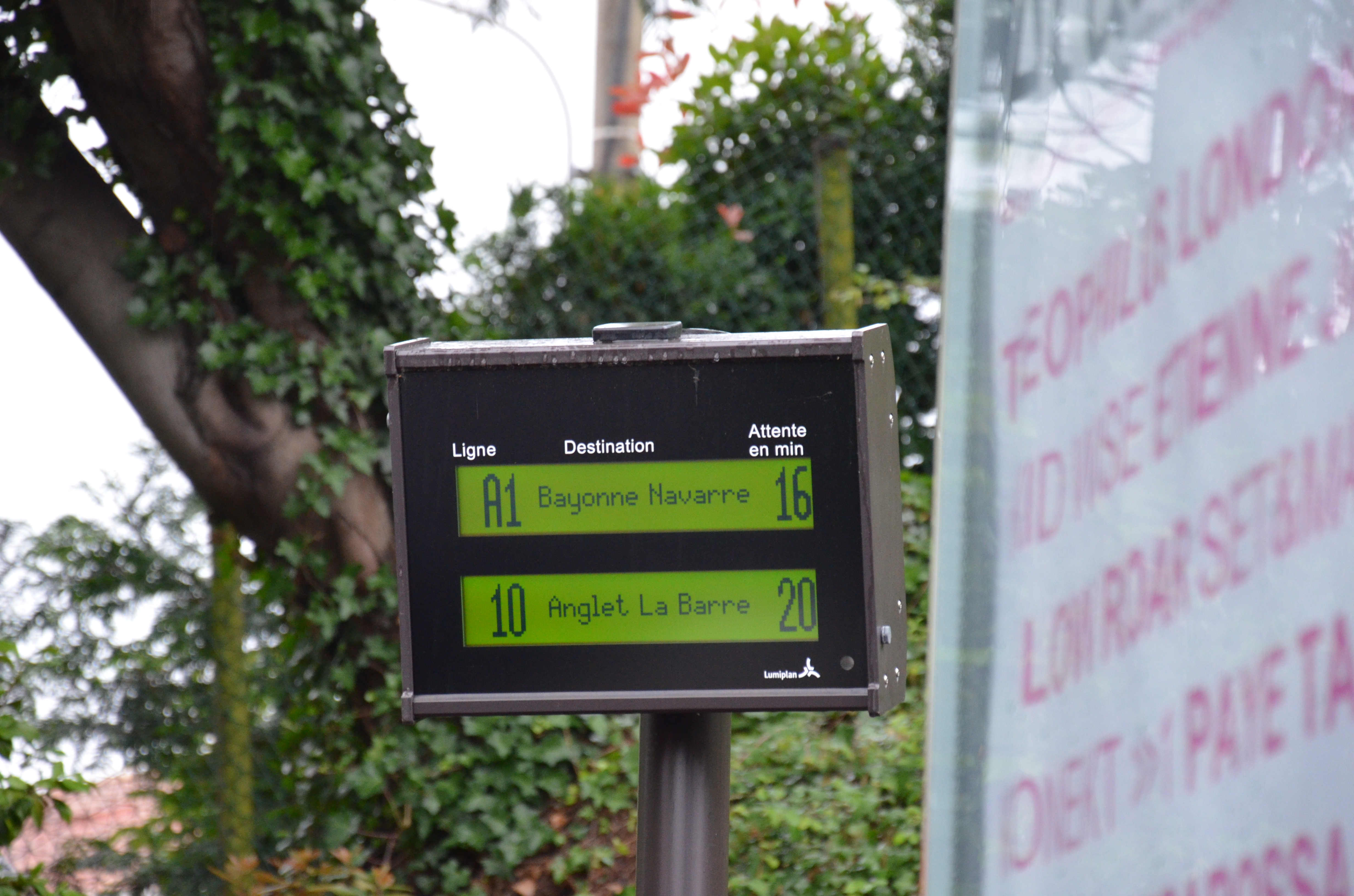 Borne d'information voyageurs (SAEIV) du réseau Chronoplus de Bayonne.